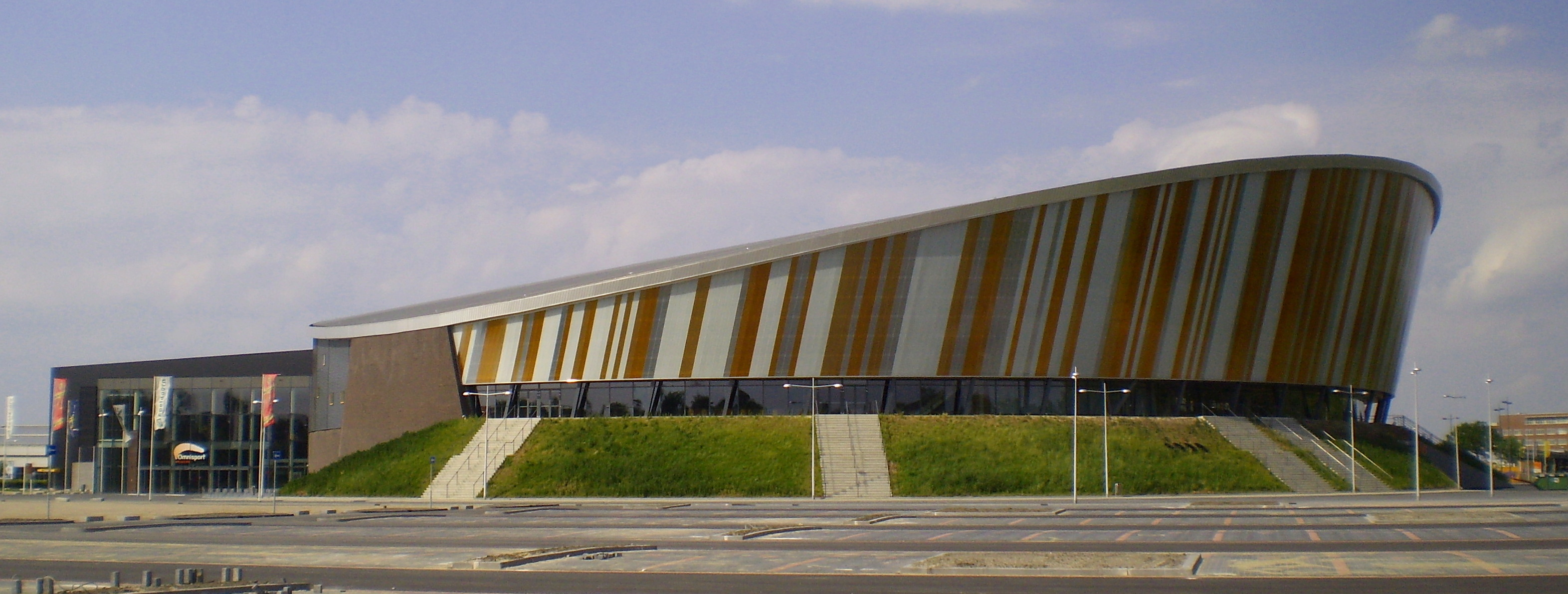 Sportstadion Omnisport Apeldoorn, Nederland